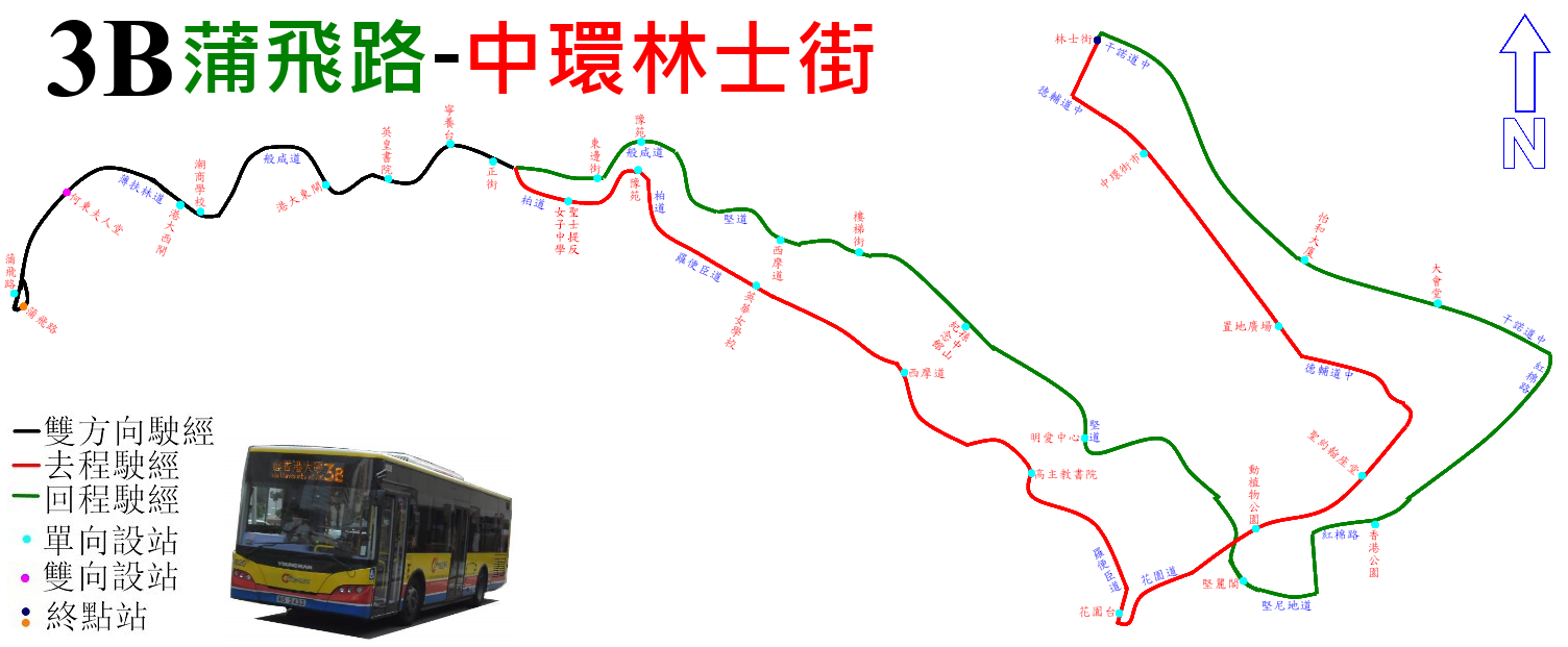 中文（香港）: 城巴3B線的走線圖